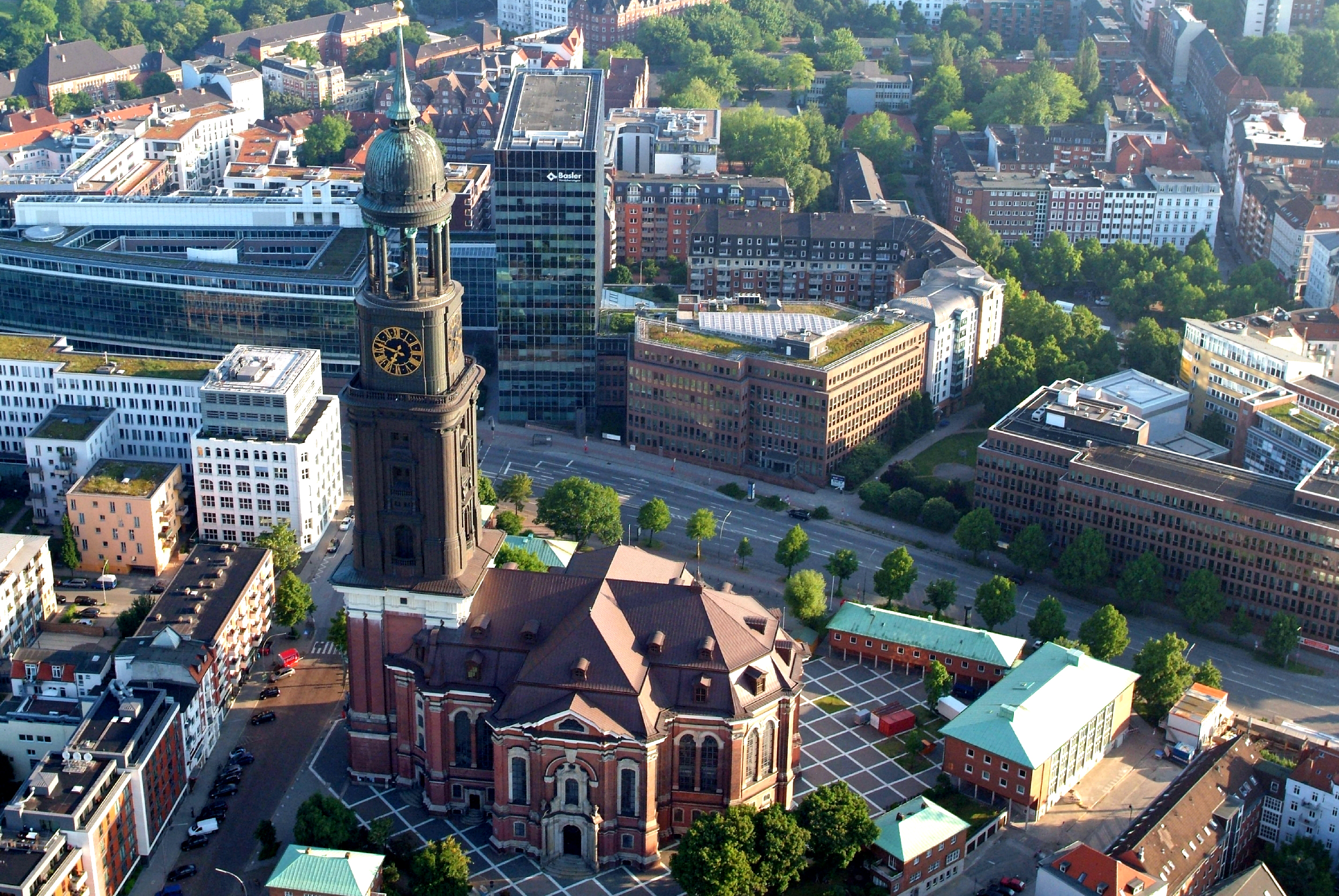 Hauptkirche St. Michaelis in Hamburg-Neustadt. This is a photograph of an architectural monument.